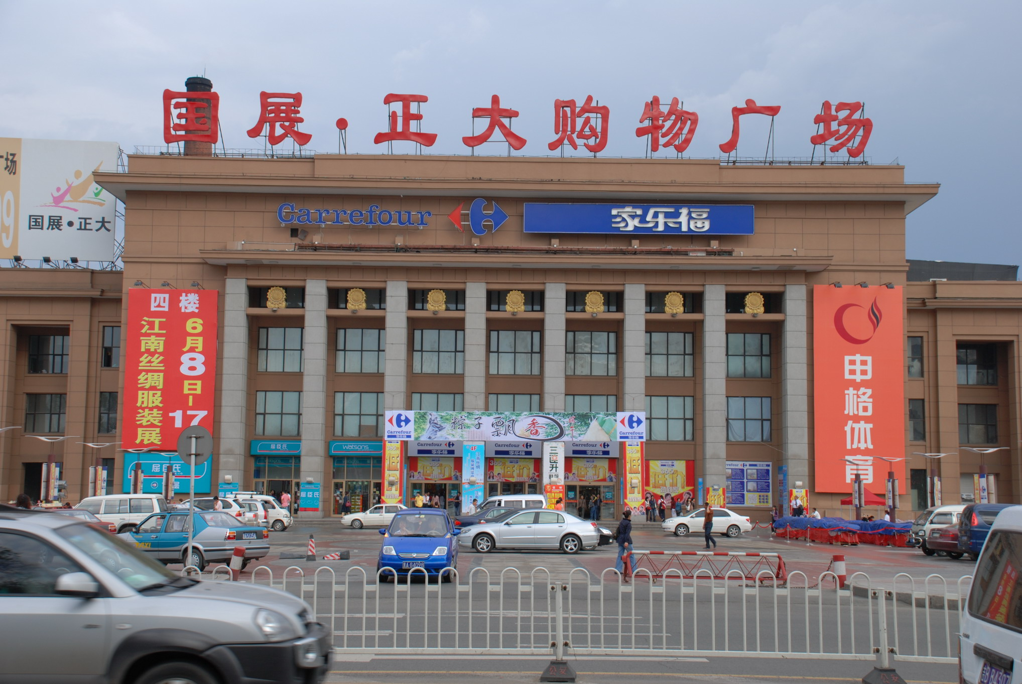 国展正大购物广场，原展览馆